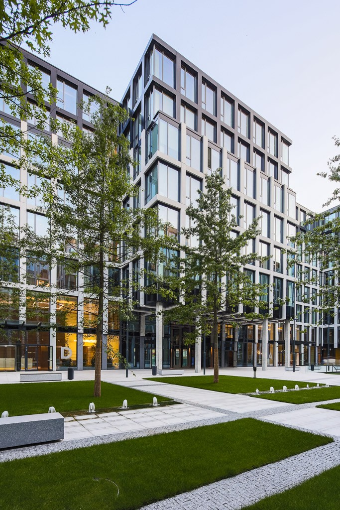 Florentinum